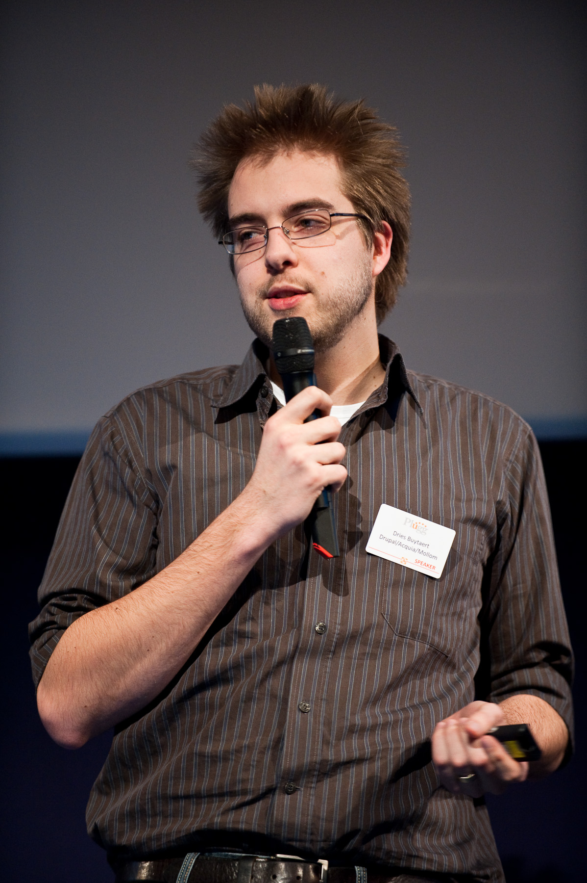 Plugg 2009: Dries Buytaert